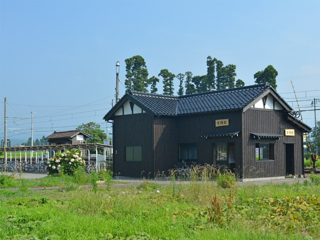 富山地方鉄道 不二越・上滝線 月岡駅駅舎